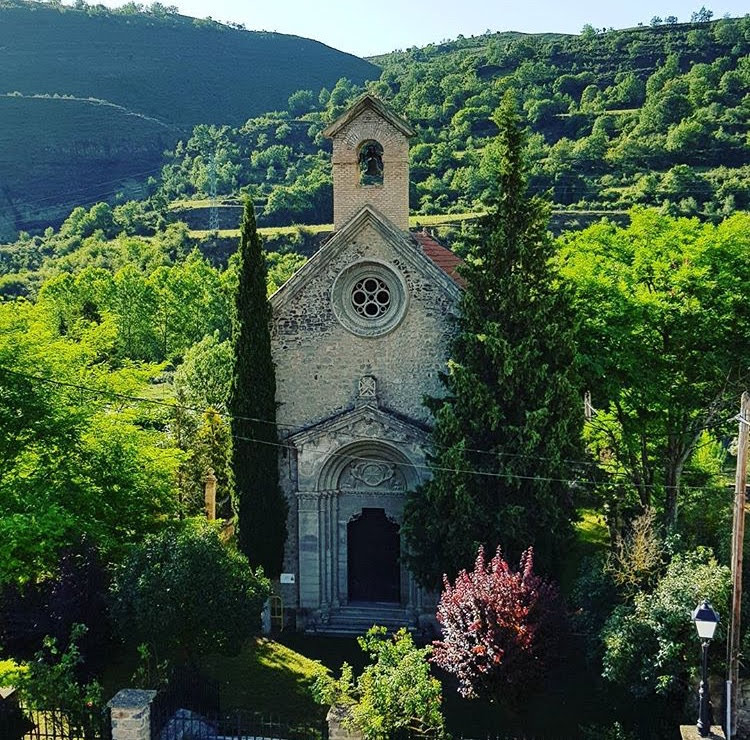 Ermita Virgen del Carmen, situada en San Román de Cameros